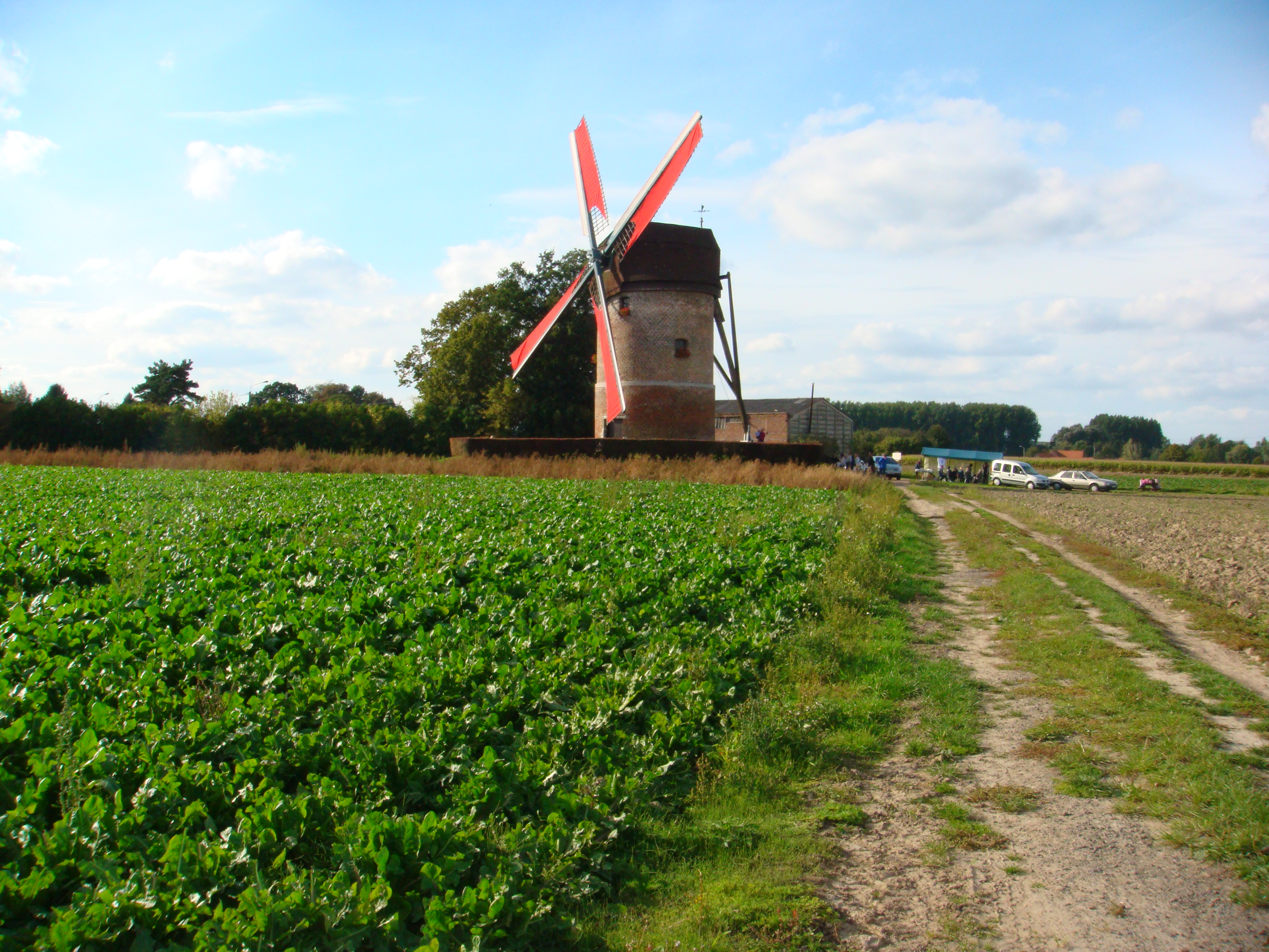 Le moulin de Vertain à Templeuve Journée du Patrimoine 2010